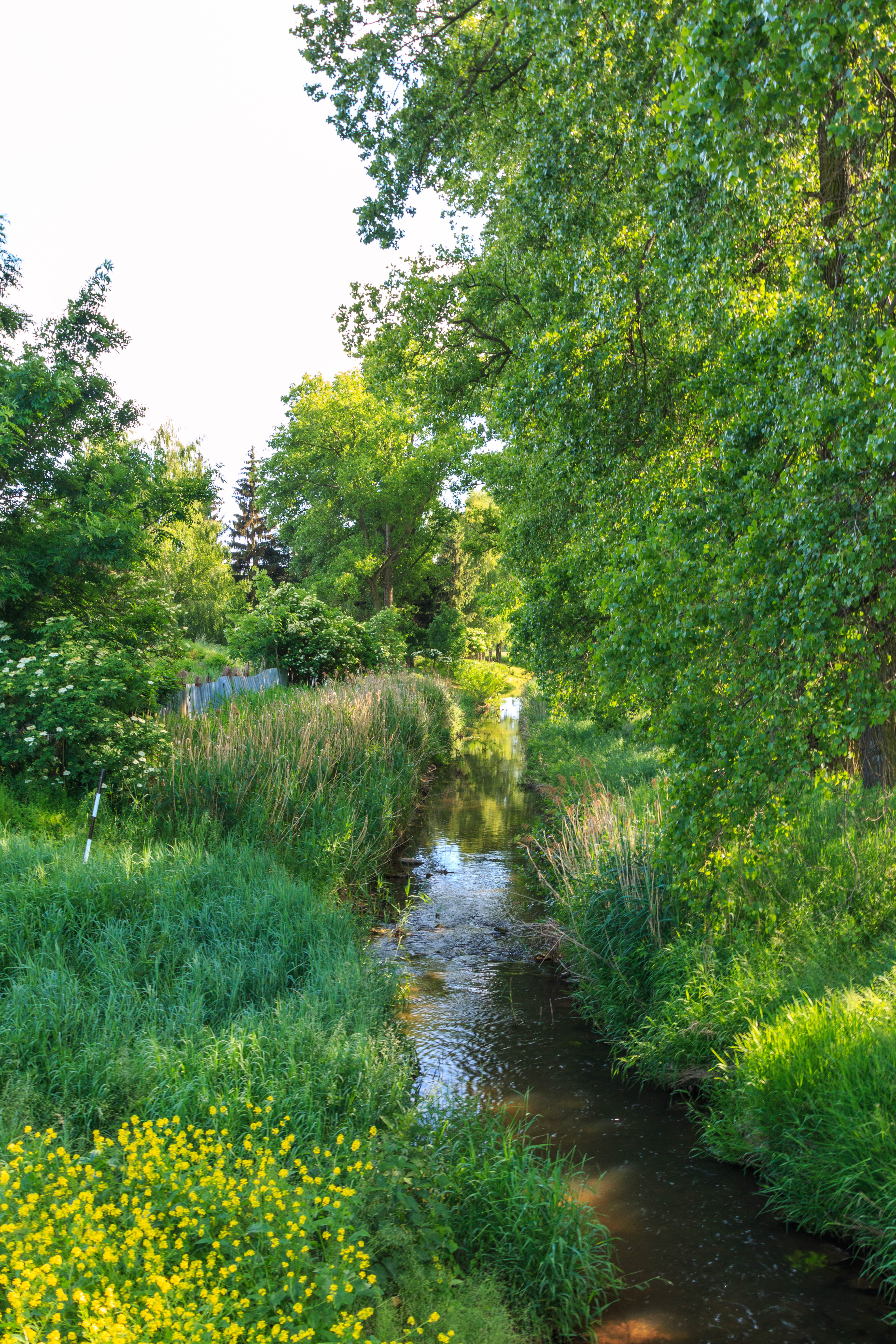 Přírodní památka Bystřice Project: Chráněná území.